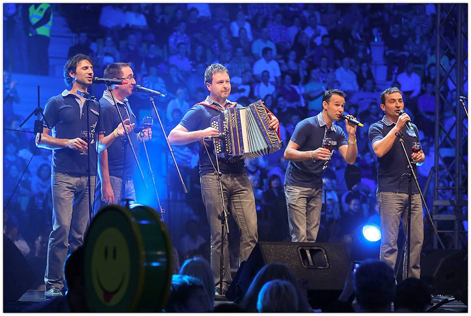 Ansambel Spev na Noči Modrijanov 2013.